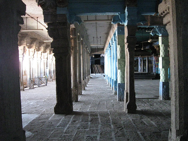 தமிழகக் கோயில்களில் காணப்படும் நூற்றுக்கால் மண்டபத்தில் ஒன்று. திருச்சிராப்பள்ளி தாயுமானவ சுவாமி ஆலயத்தில் எடுக்கப்பட்ட காட்சி.